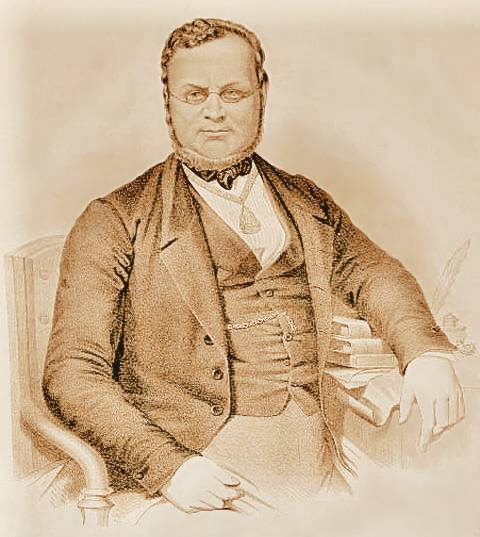 G. Riccio, Ritratto di Camillo Benso Conte di Cavour, litografia.